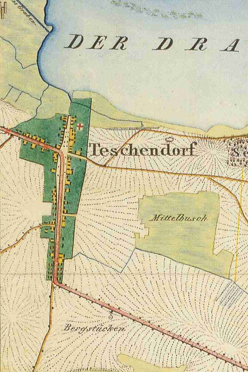 Karte von Teschendorf, Kreis Ruppin, Provinz Brandenburg, 1840